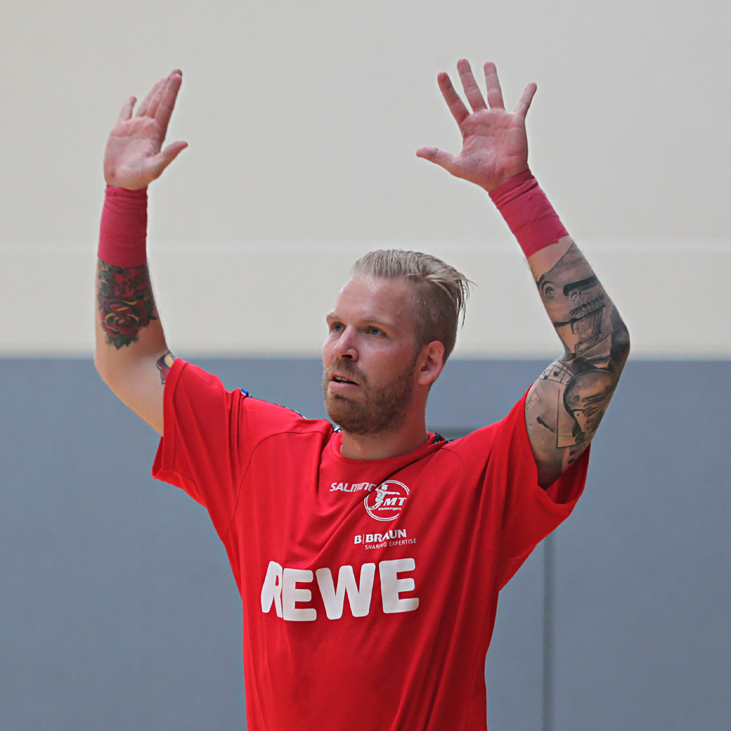 Johan Sjöstrand, Torwart der MT Melsungen. Fotografiert am 14. Juli 2015 in der Heppenheimer Nibelungenhalle beim Maisch Cup.